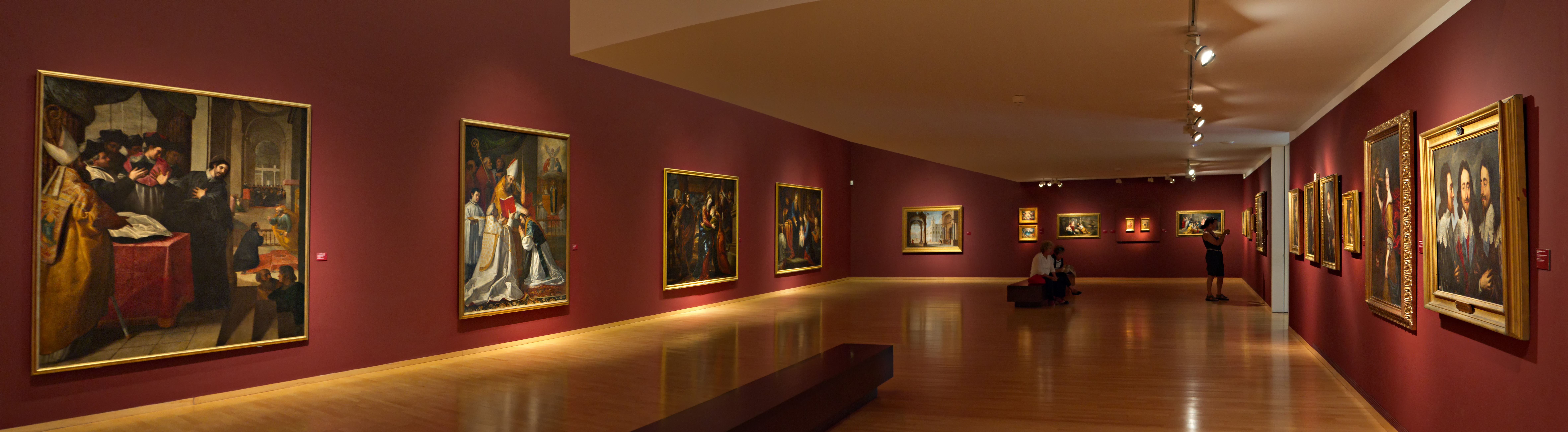 Sala de pintura de los siglos XVI y XVII en el Museo de Bellas Artes de A Coruña.